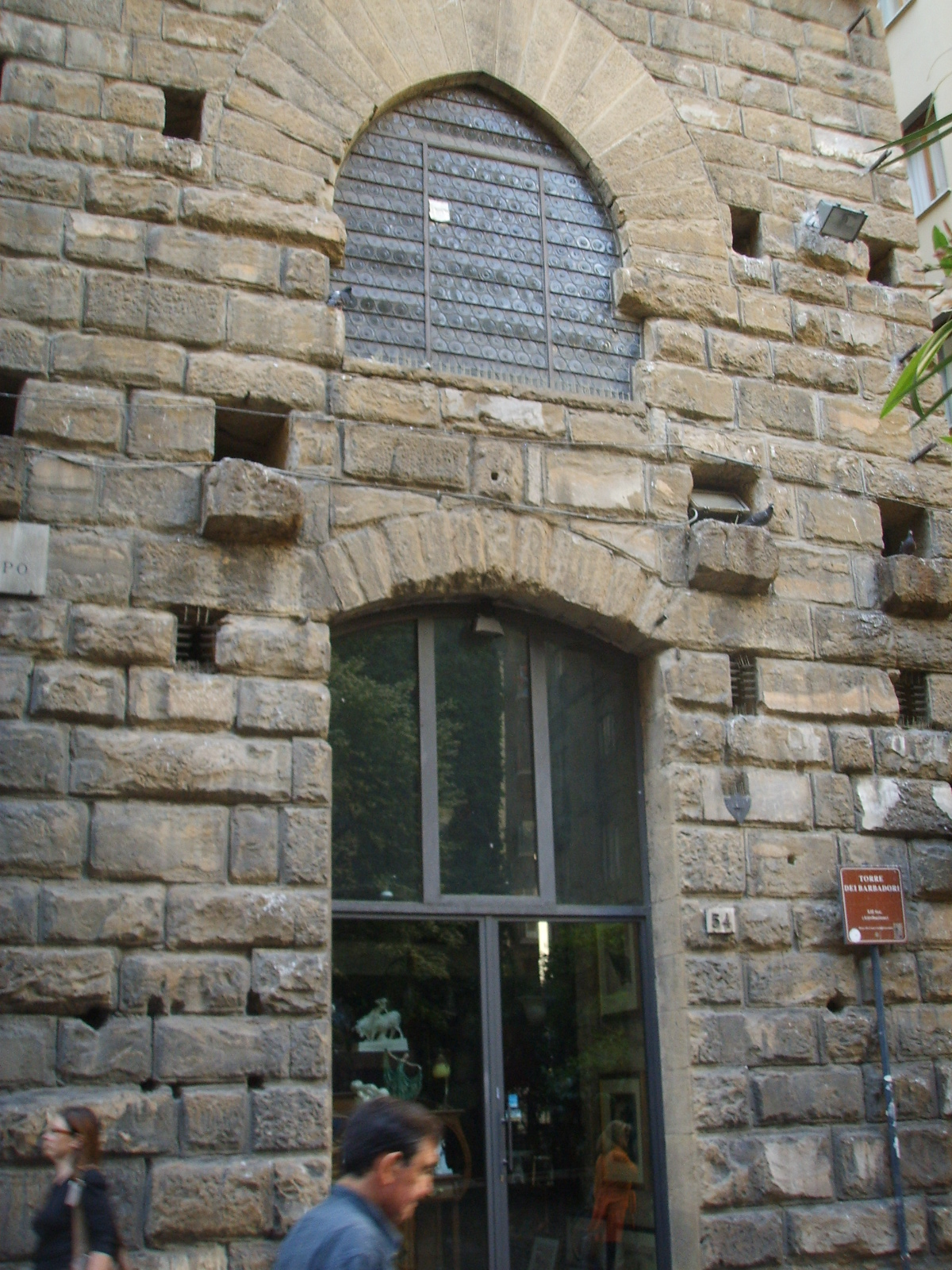 Torre dei barbadori, portale